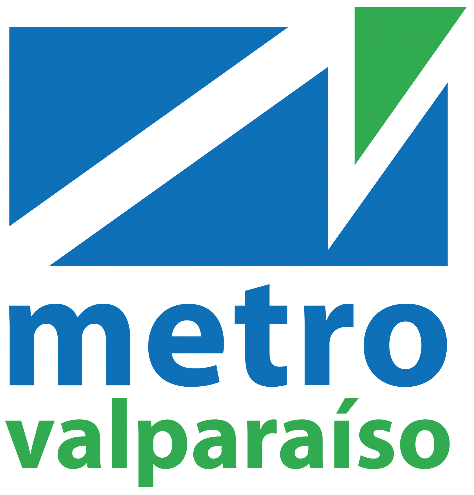 Logo de Metro Valparaíso (Merval)